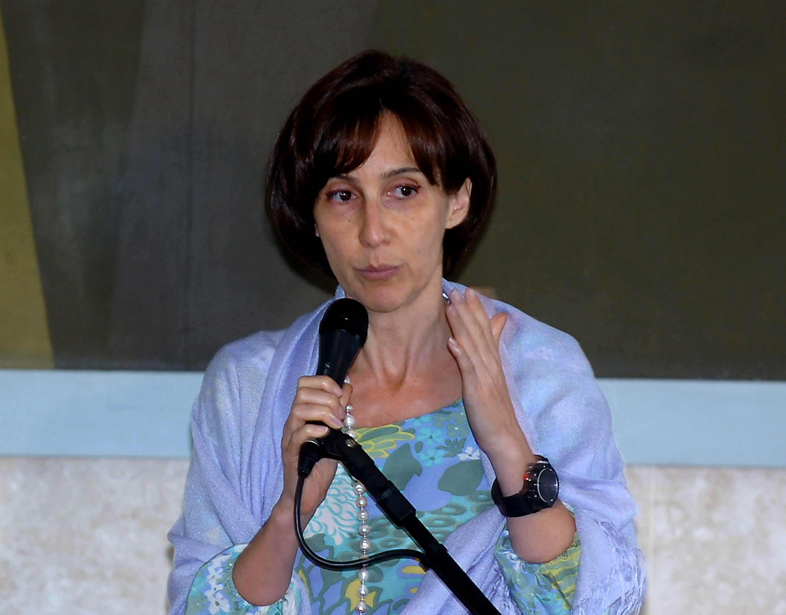 Viviane Senna, presidente do Instituto Ayrton Senna, participa da 24ª reunião plenária do Conselho de Desenvolvimento Econômico e Social (CDES), no Palácio do Planalto.